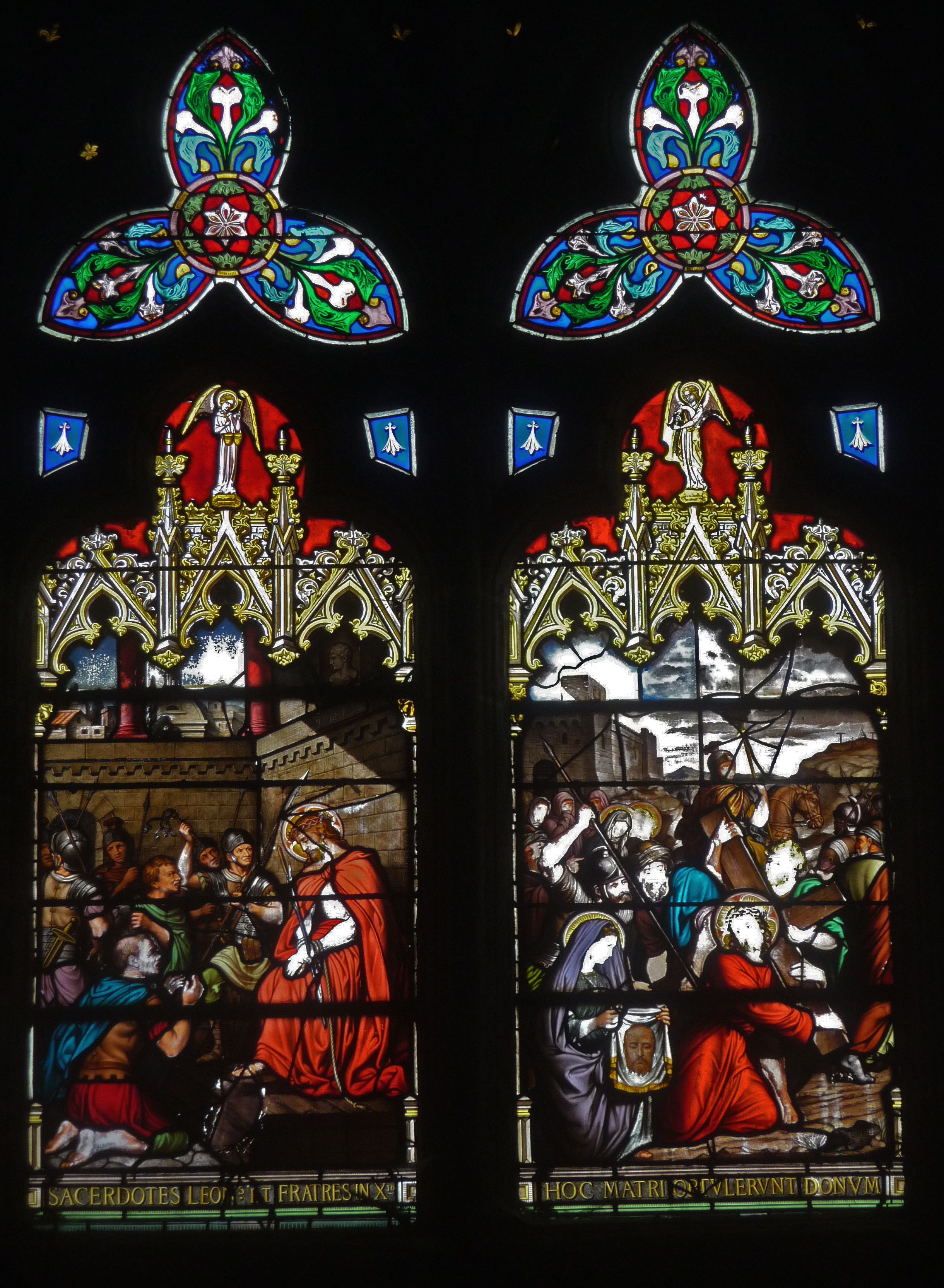 Saint-Pol-de-Léon : cathédrale Saint-Pol-Aurélien,vitrail Passion du Christ 2 (Condamnation et Montée au Golgotha)